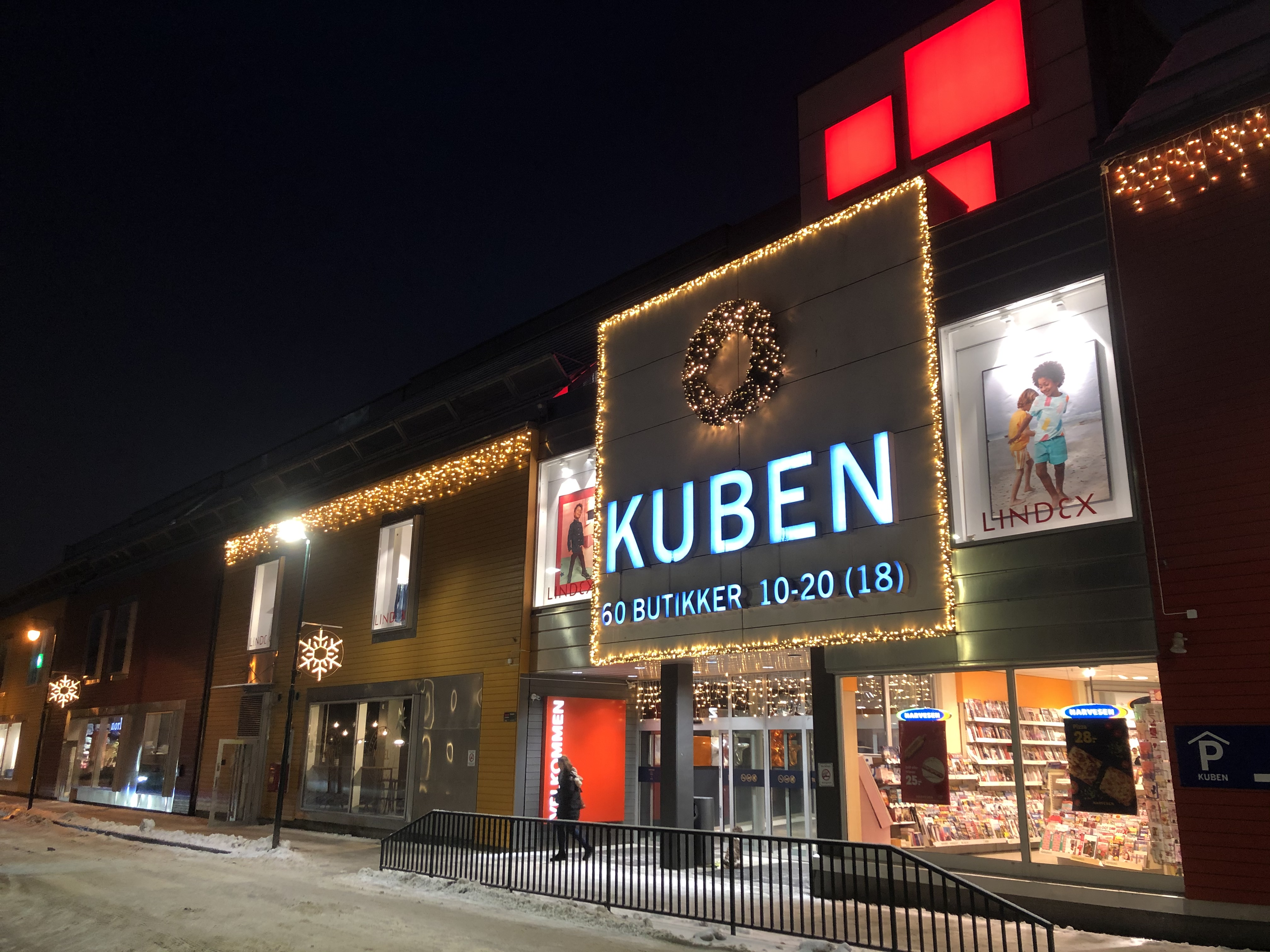 Kuben senter Hønefoss, desember 2019.